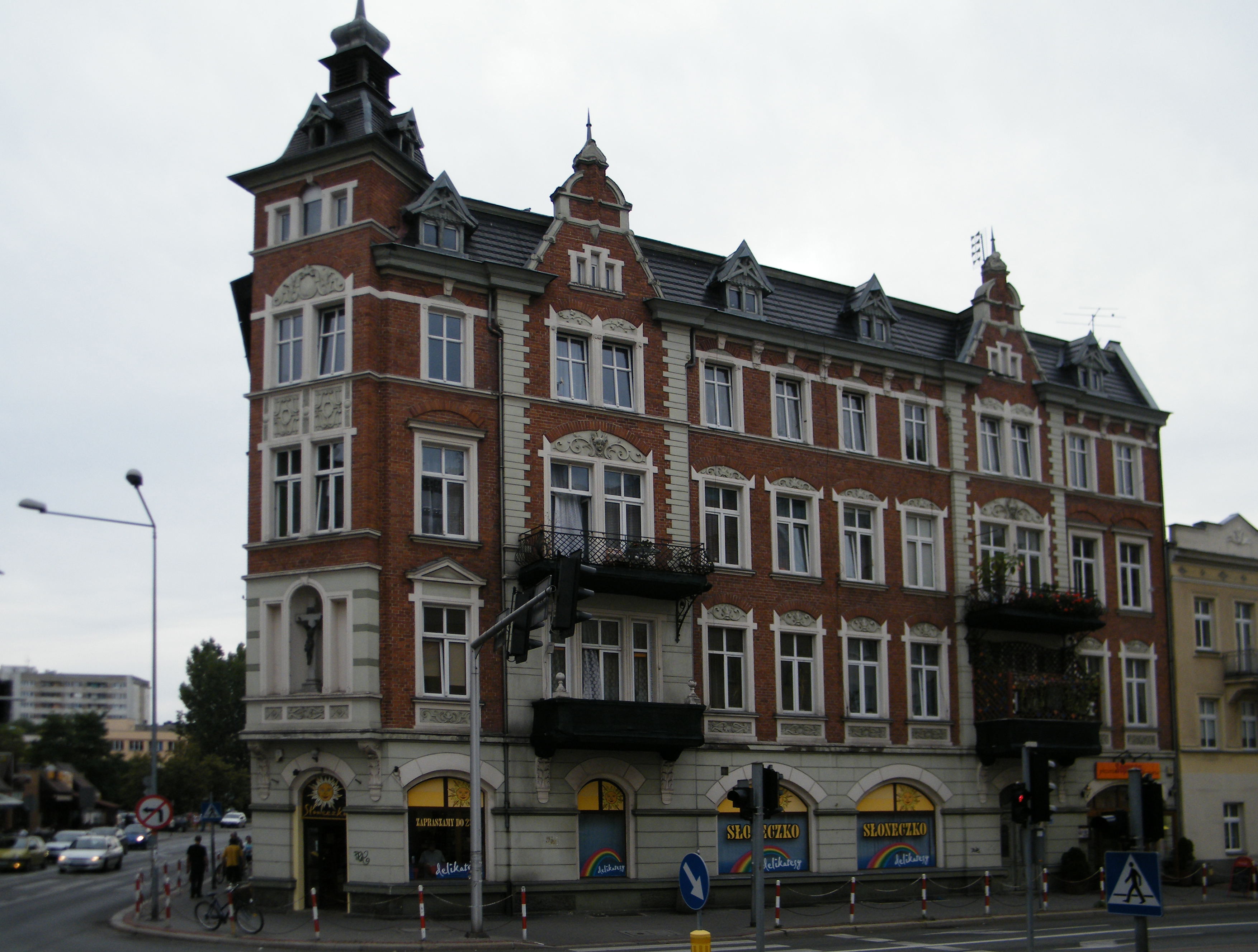 Opole, ul. Piłsudskiego 10 - kamienica, kon. XIX